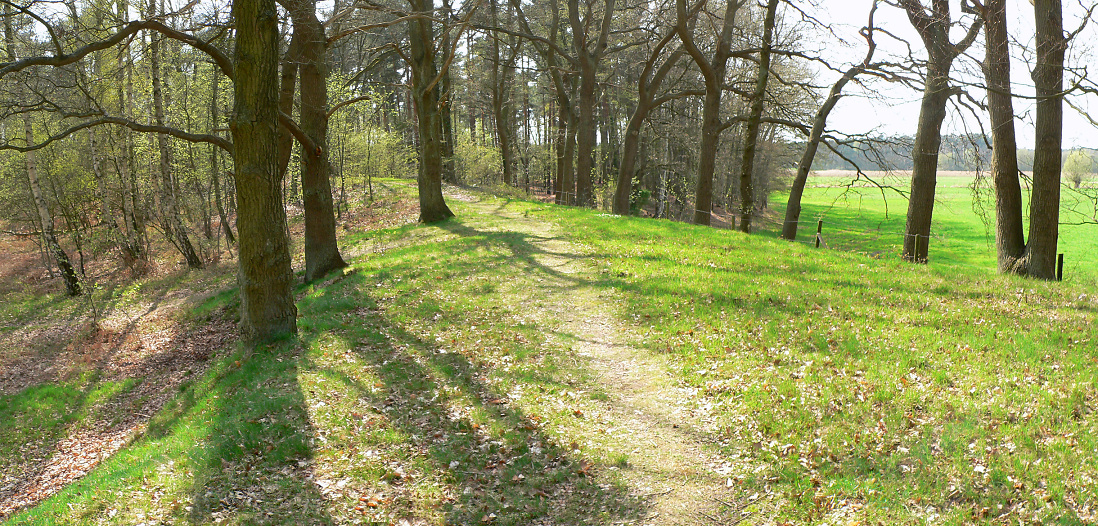 Wallkrone des Ringwall von Burg Circular rampart at Burg, near Celle, Lower Saxony, Germany.